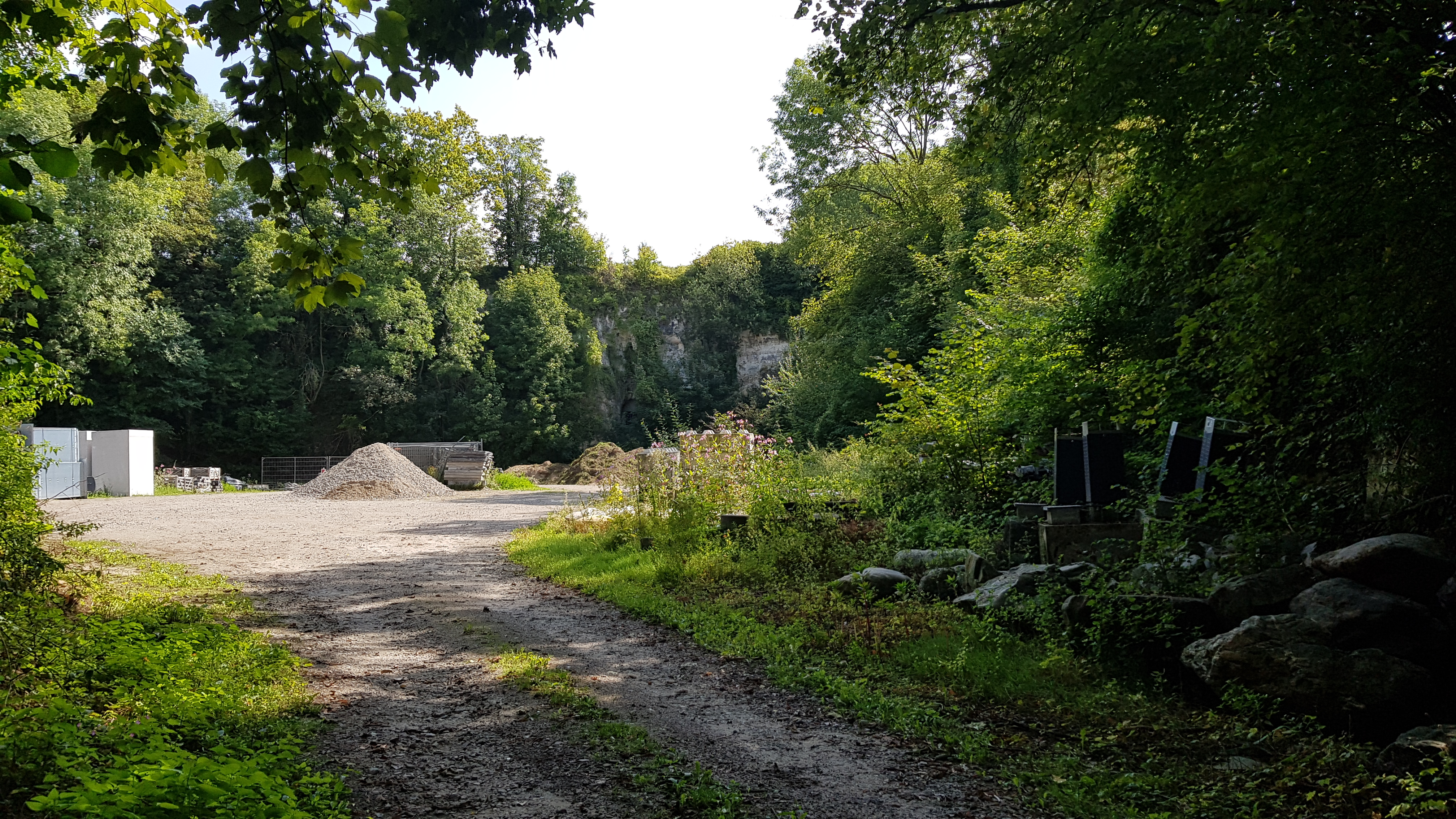 Groeve Schaelsberg, Valkenburg aan de Geul, Nederland